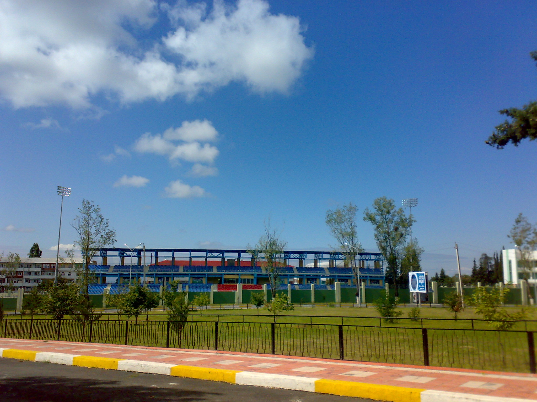 Stadioon- Zagatala Merkezi Stadionu